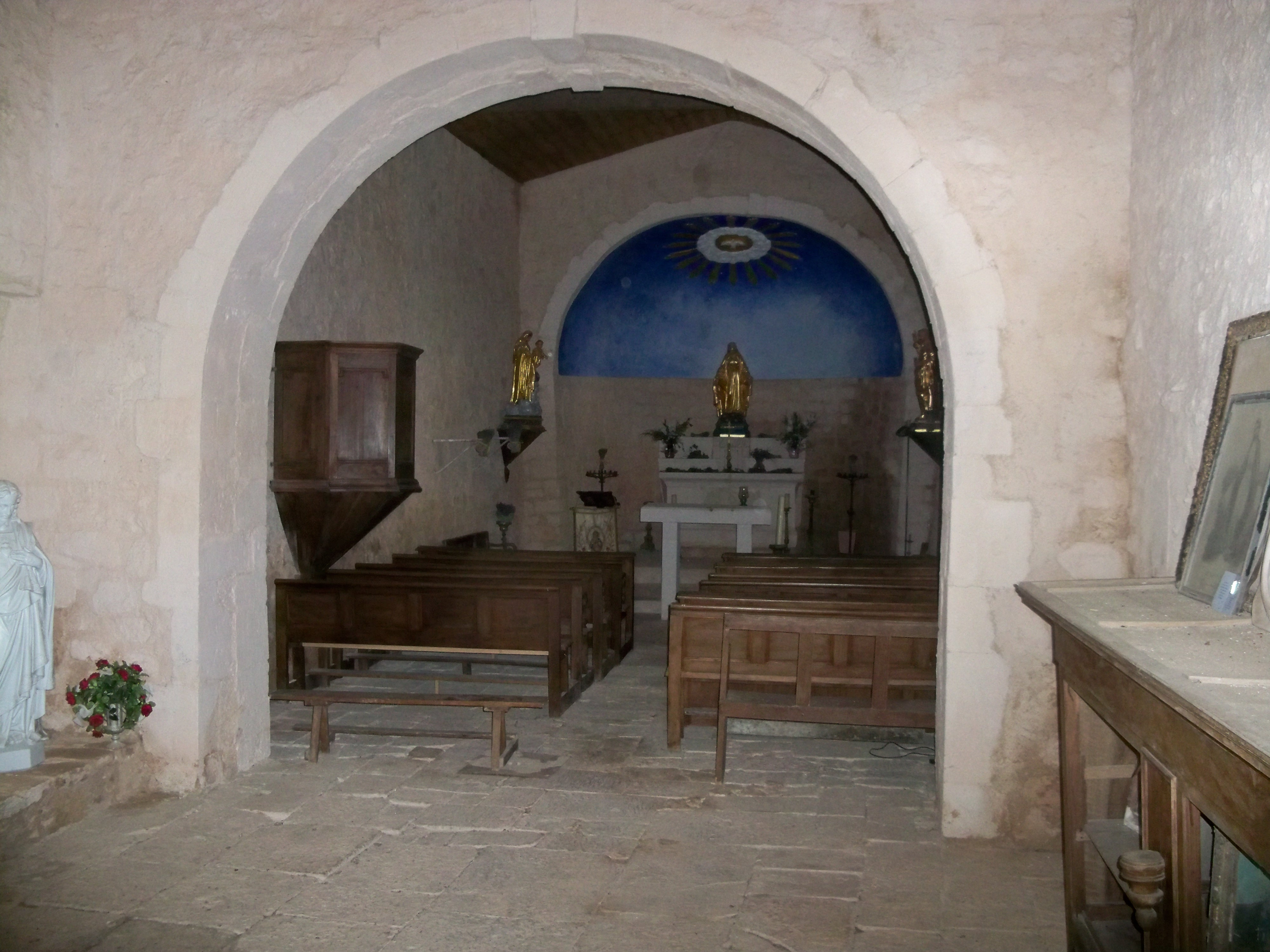 Intérieur de la Chapelle Notre Dame de Lamaron, Lagarde d'Apt, Vaucluse, France